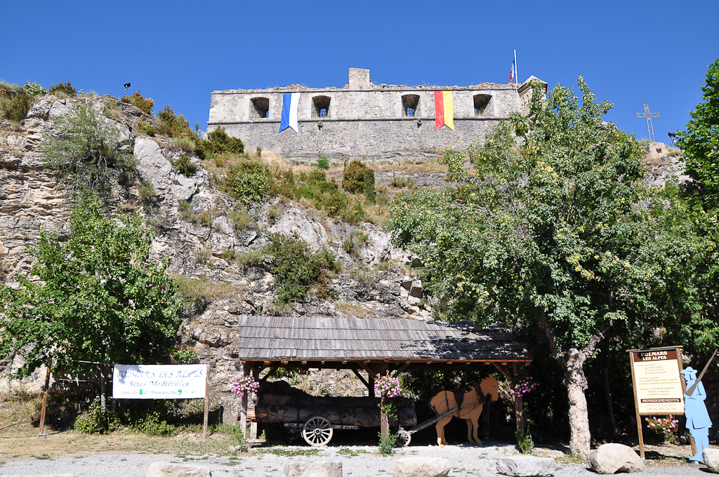 Colmars Château et reconstitution historique